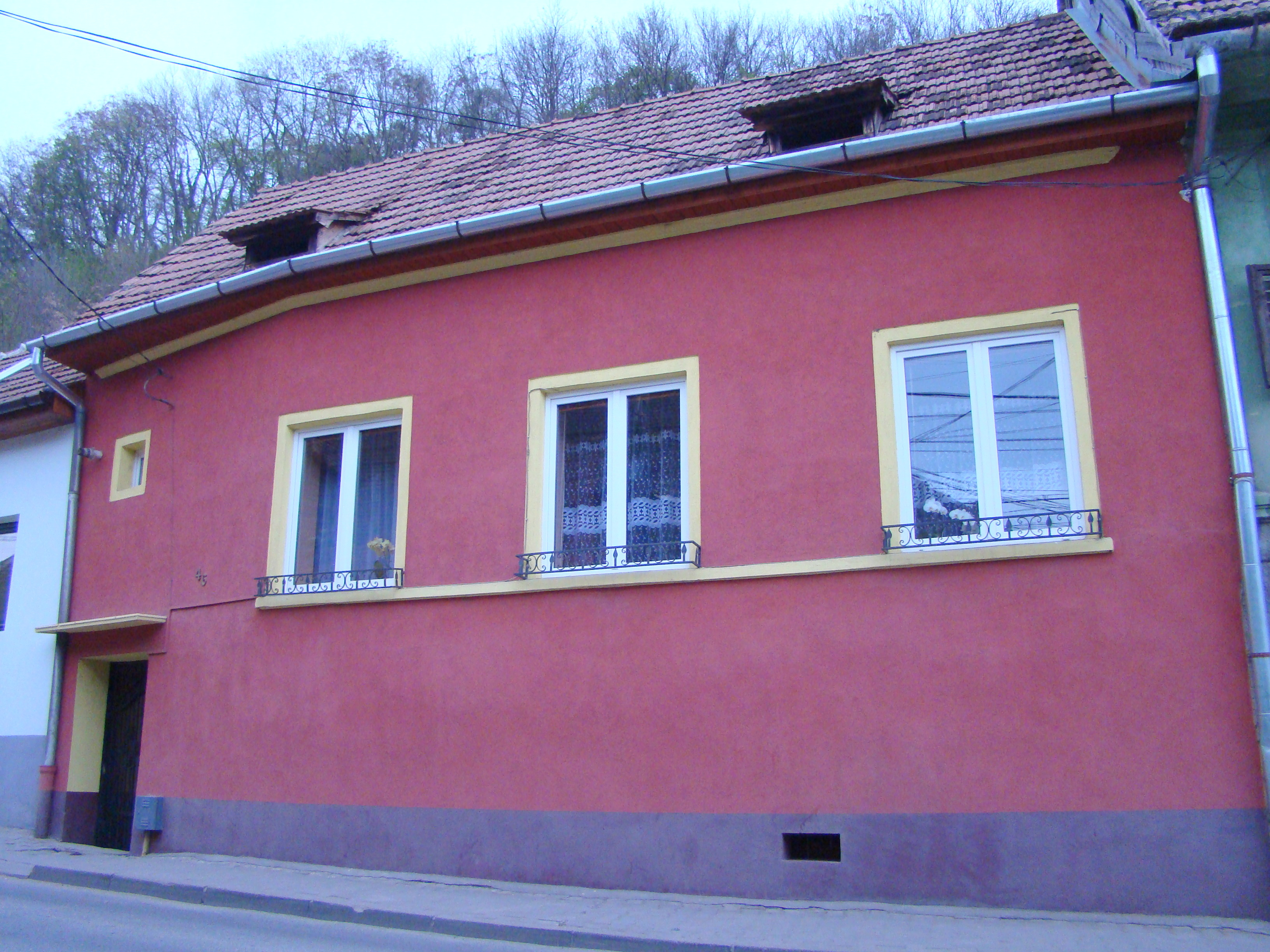 Casă, municipiul Sighișoara, tr. Chendi Ilarie 46 sec. XIX